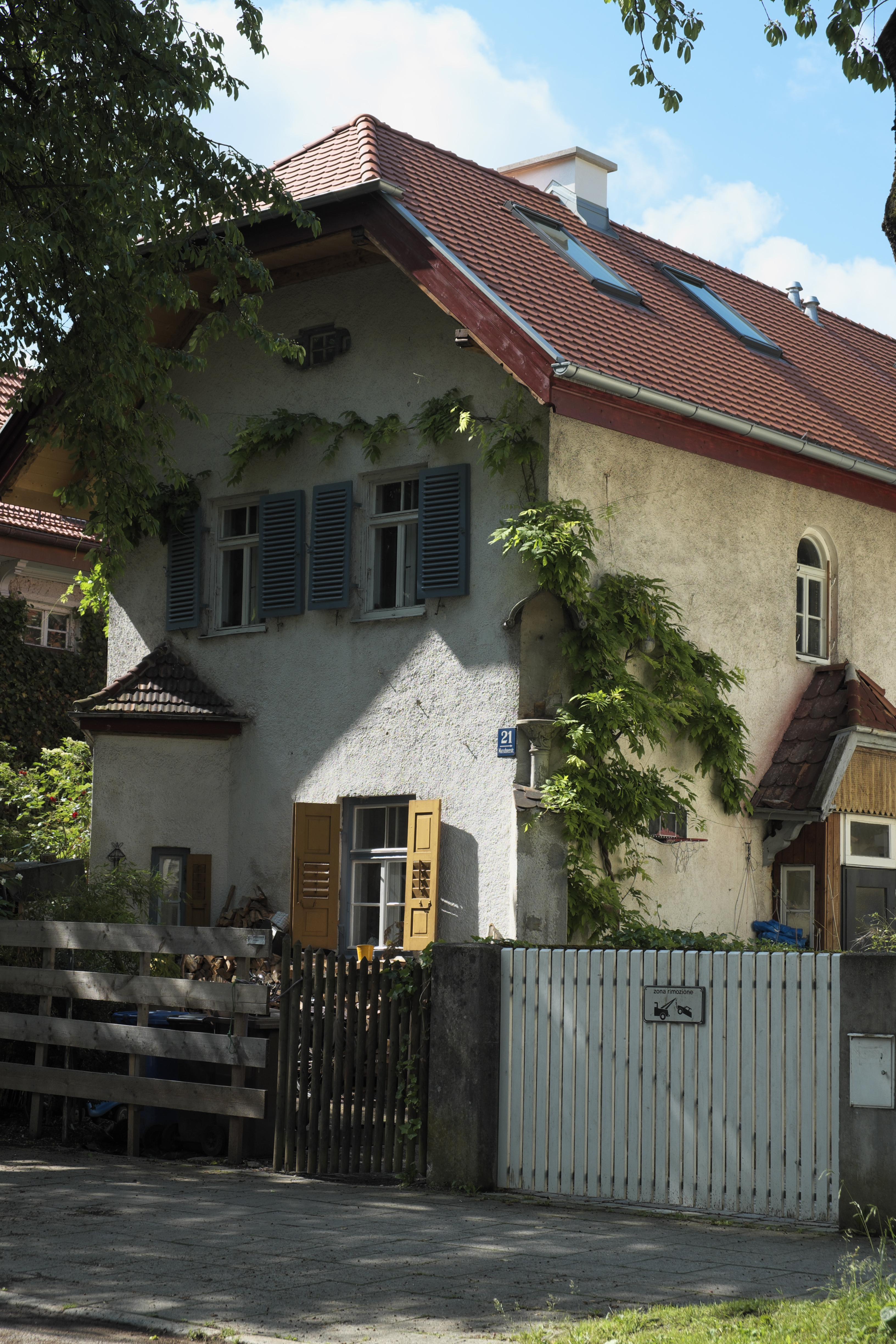 Wohnhaus in der Marschnerstraße 21 in Pasing im Stadtbezirk Pasing-Obermenzing in München (Bayern/Deutschland)